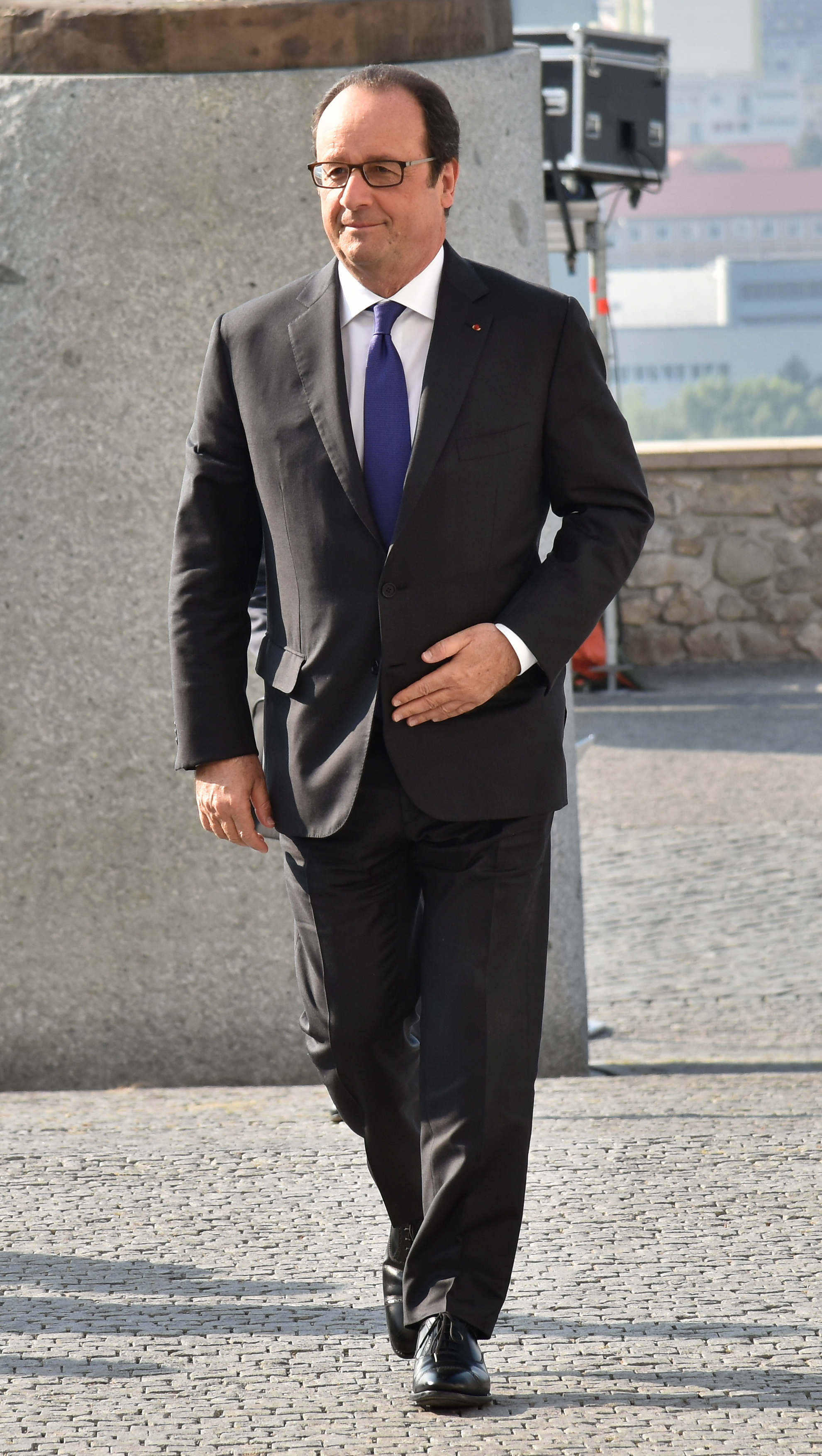 BRATISLAVA SUMMIT 16 SEPTEMBER 2016 ph halime sarrag